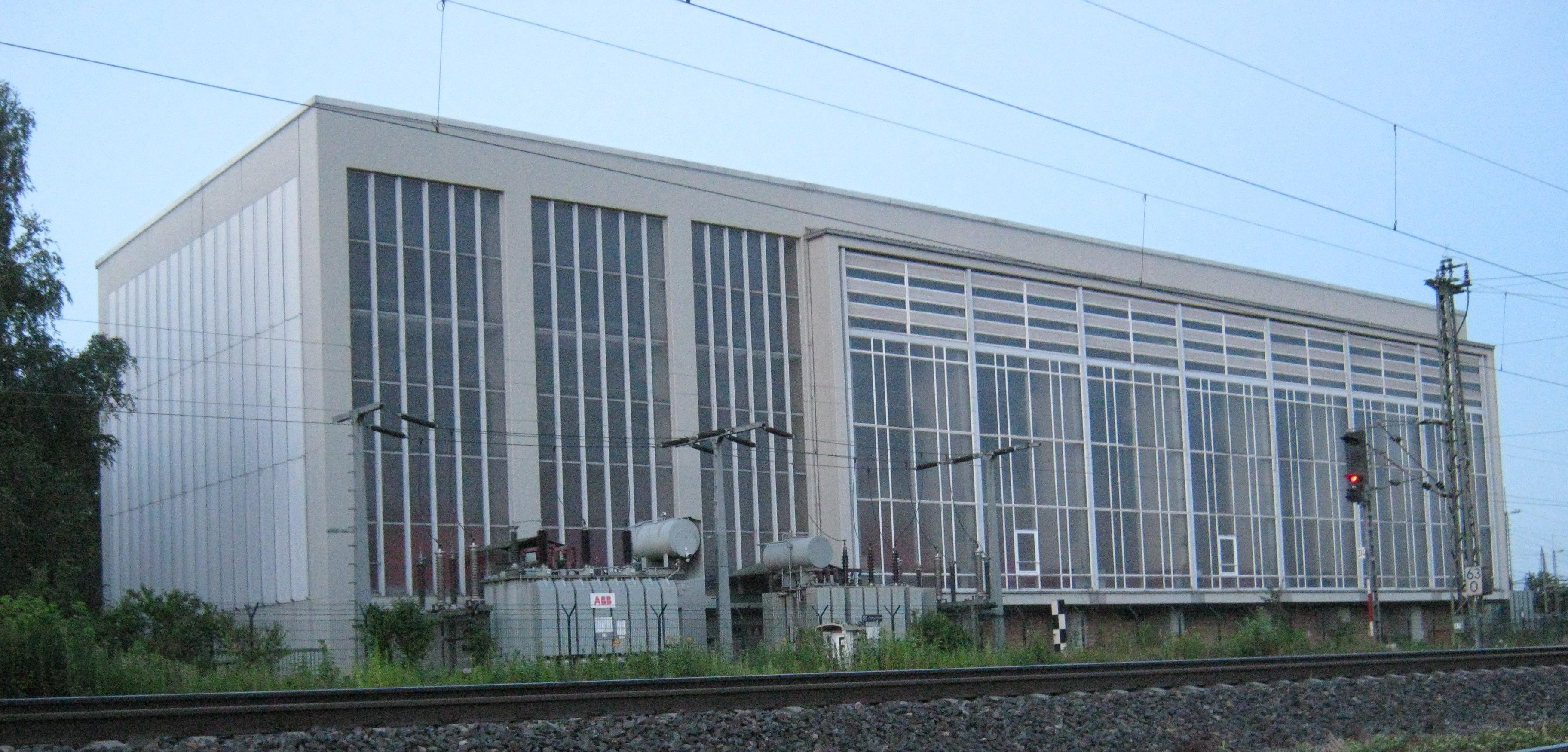 Maschinenhalle des Bahnstromumformerwerks Karlsruhe